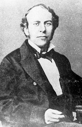 Joseph Toynbee (1815-1866)